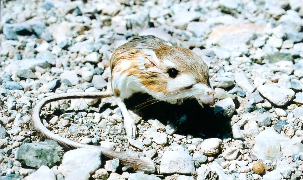 Merriam's kangaroo rat (Dipodomys merriami).